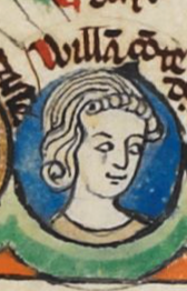 William of Talou